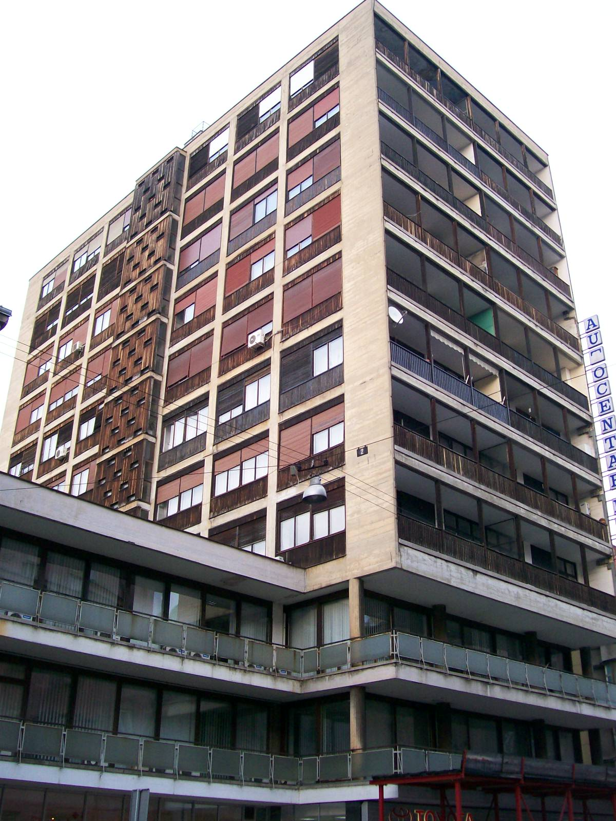 Drveni neboder u Marticevoj ulici, Zagreb